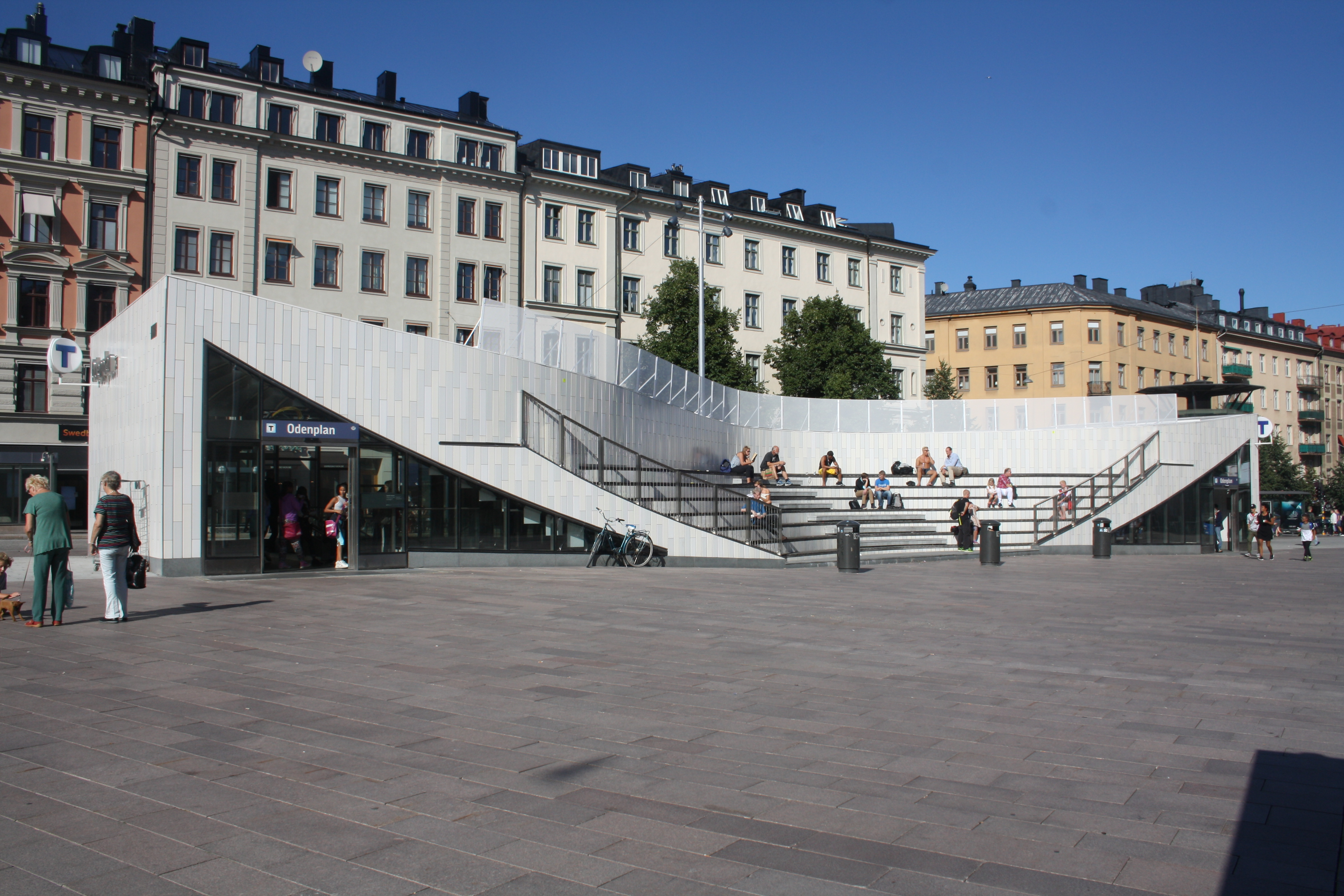 Odenplan augusti 2016